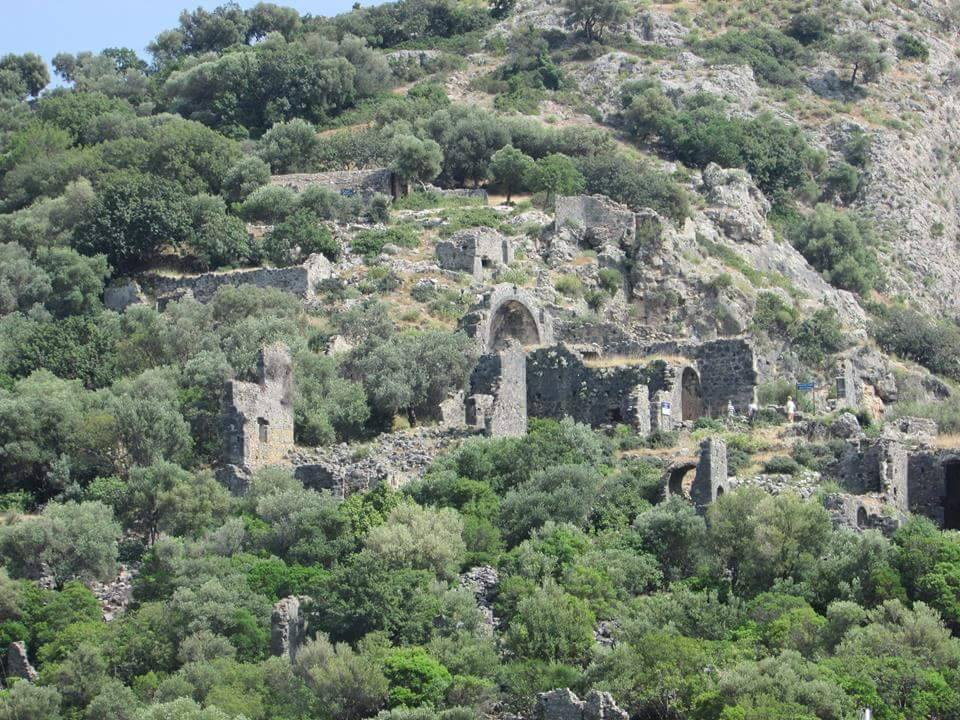 Gemiler Adasındaki kalıntılardan bir görünüm.